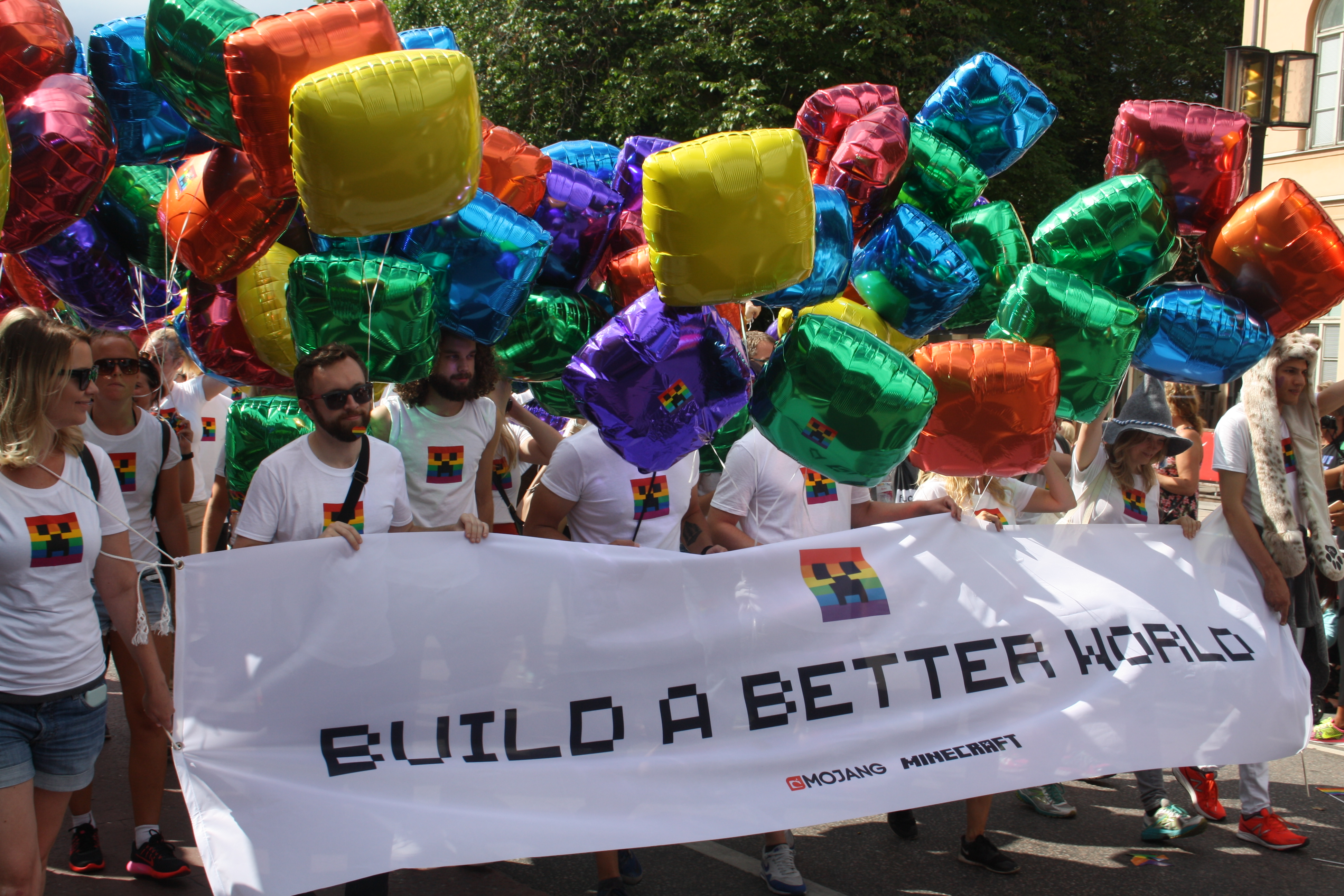 Mojang i Stockholm Pride 2016